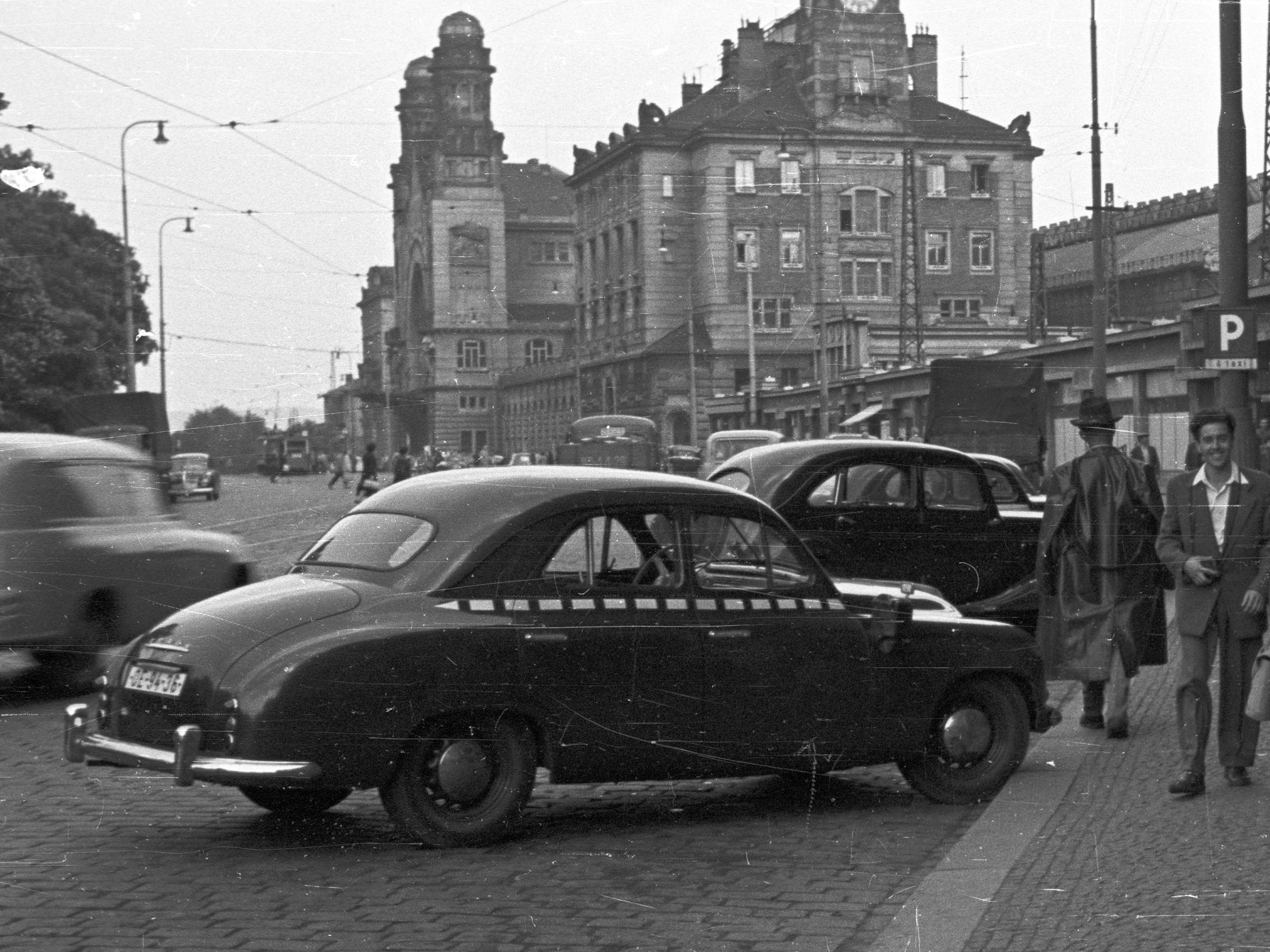 Wilsonova ulice, szemben a főpályaudvar. Az előtérben Skoda 1200-as személygépkocsi. Location: Czech Republik, Prague Tags: Skoda-brand, taxicab, Czechoslovak brand, Czechoslovakia, street view, genre painting, sign-board, lamp post, watch, train station, church clock Title: Wilsonova ulice, szemben a főpályaudvar. Az előtérben Skoda 1200-as személygépkocsi.